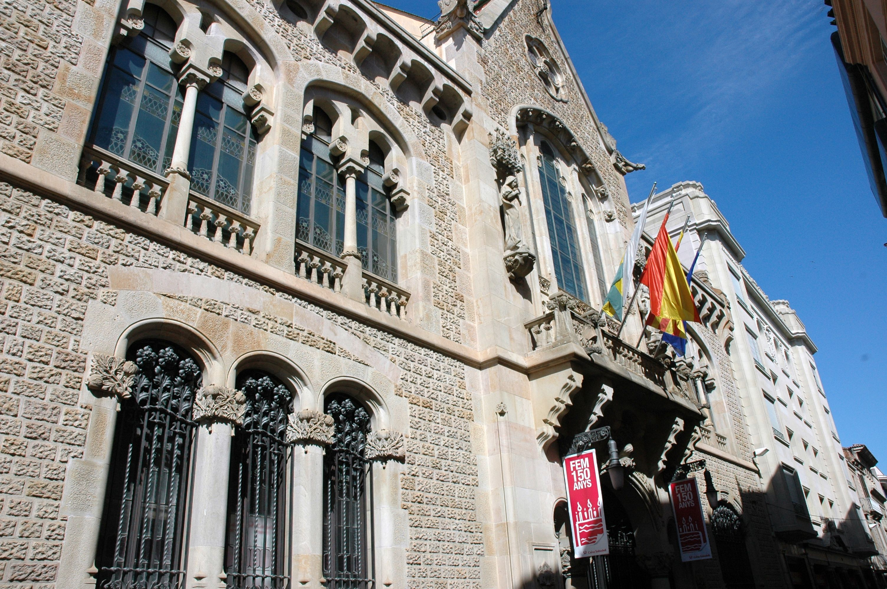 Seu central de la Caixa Sabadell, obra de l'arquitecte Jeroni Martorell